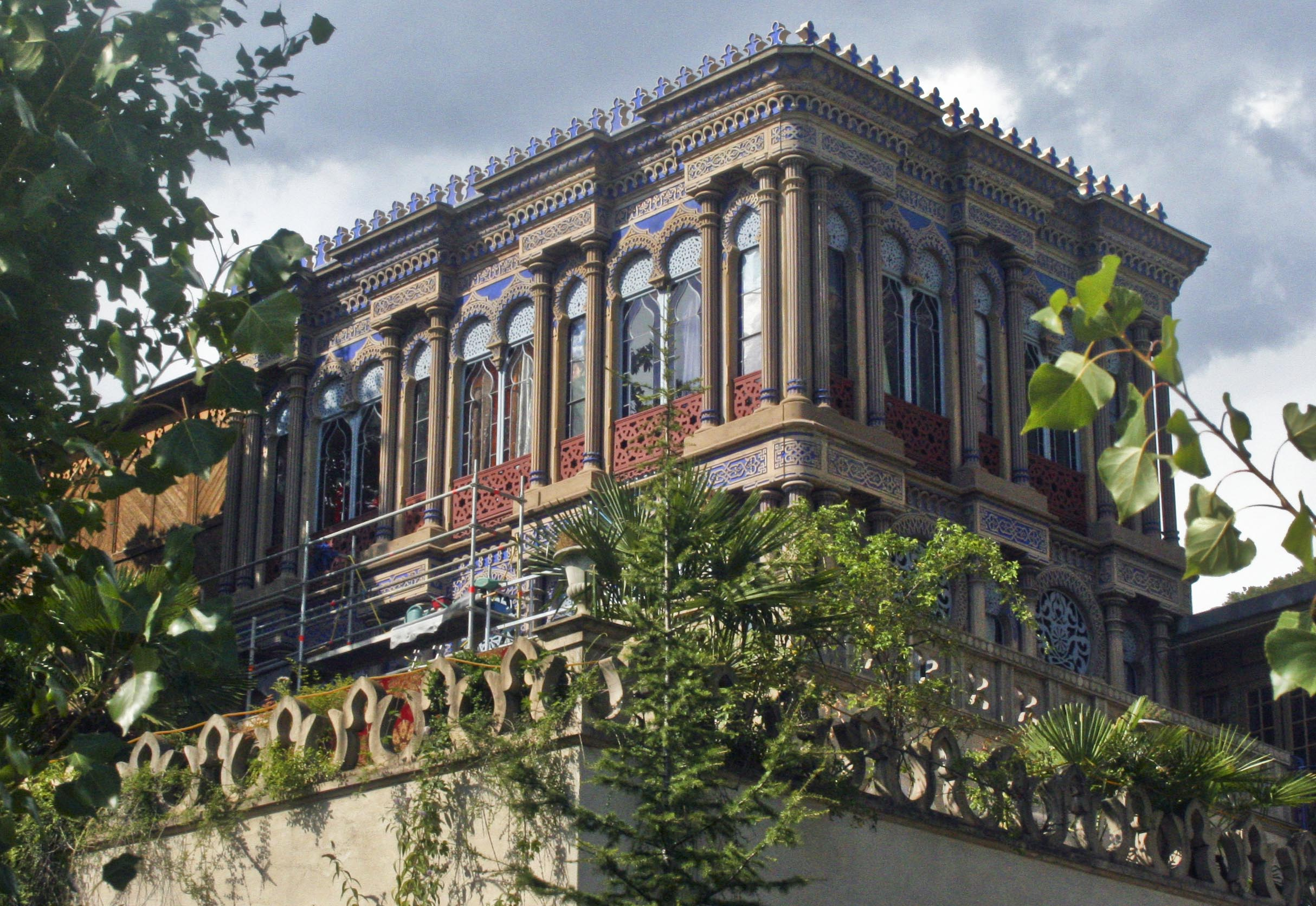 Villa La Casamaures — vue des jardins. à Saint-Martin-le-Vinoux, près de Grenoble (Isère), France